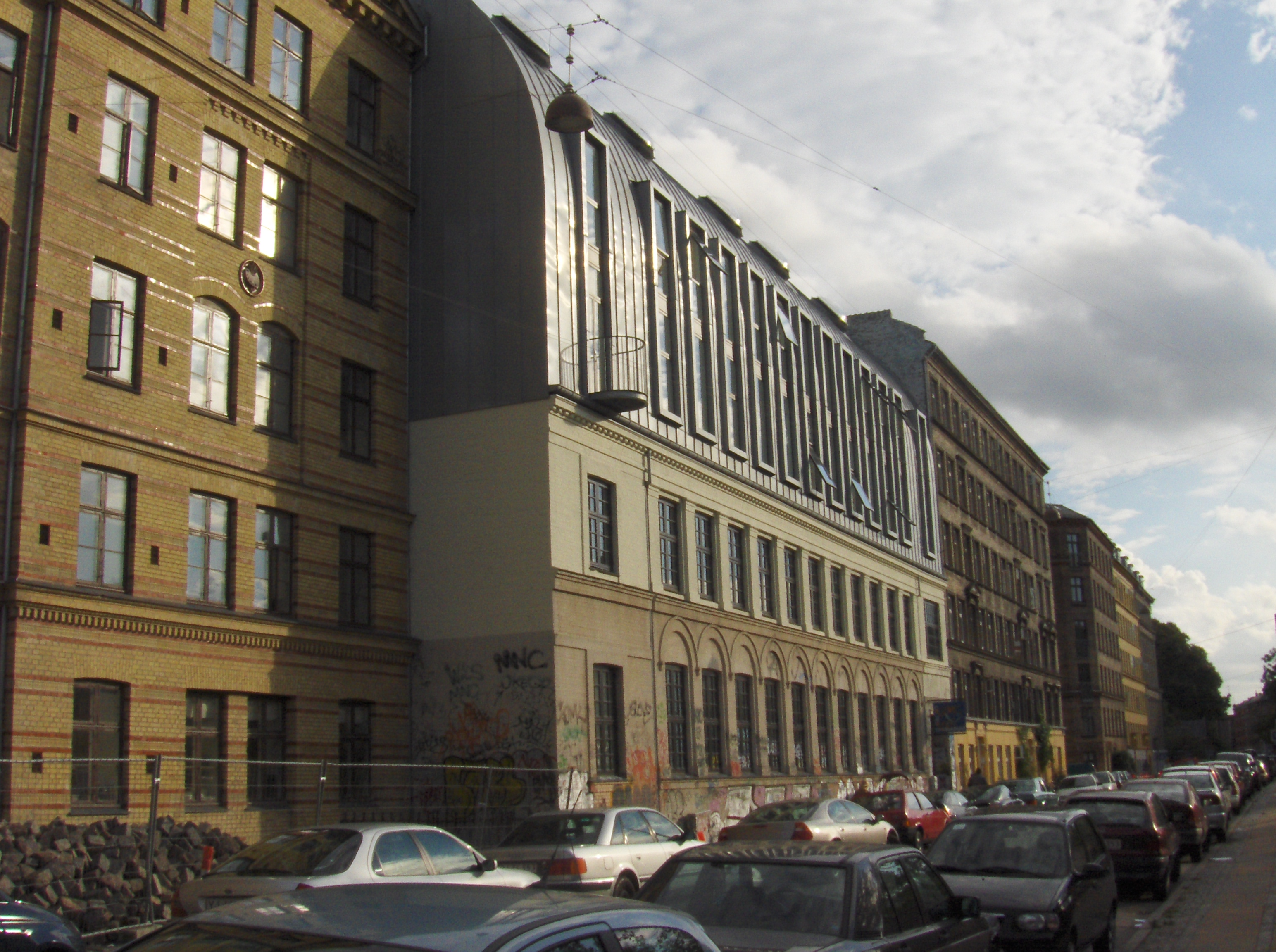 Det frie Gymnasium fra nord